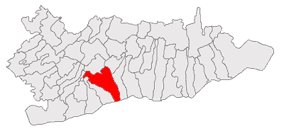 Categorie:Hărţi ale judeţului Călăraşi